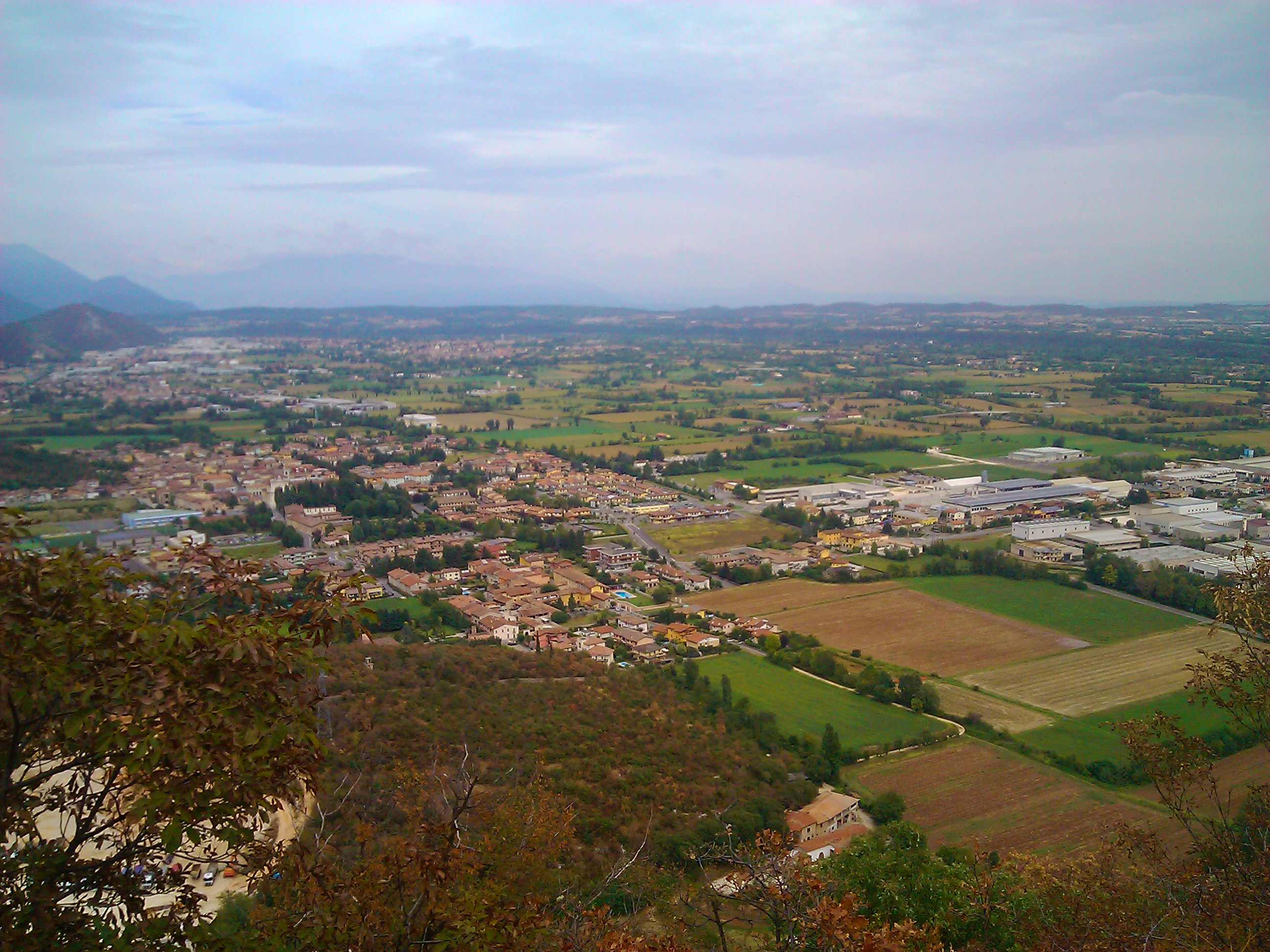 Nuvolera in una veduta dal Monte Camprelle.